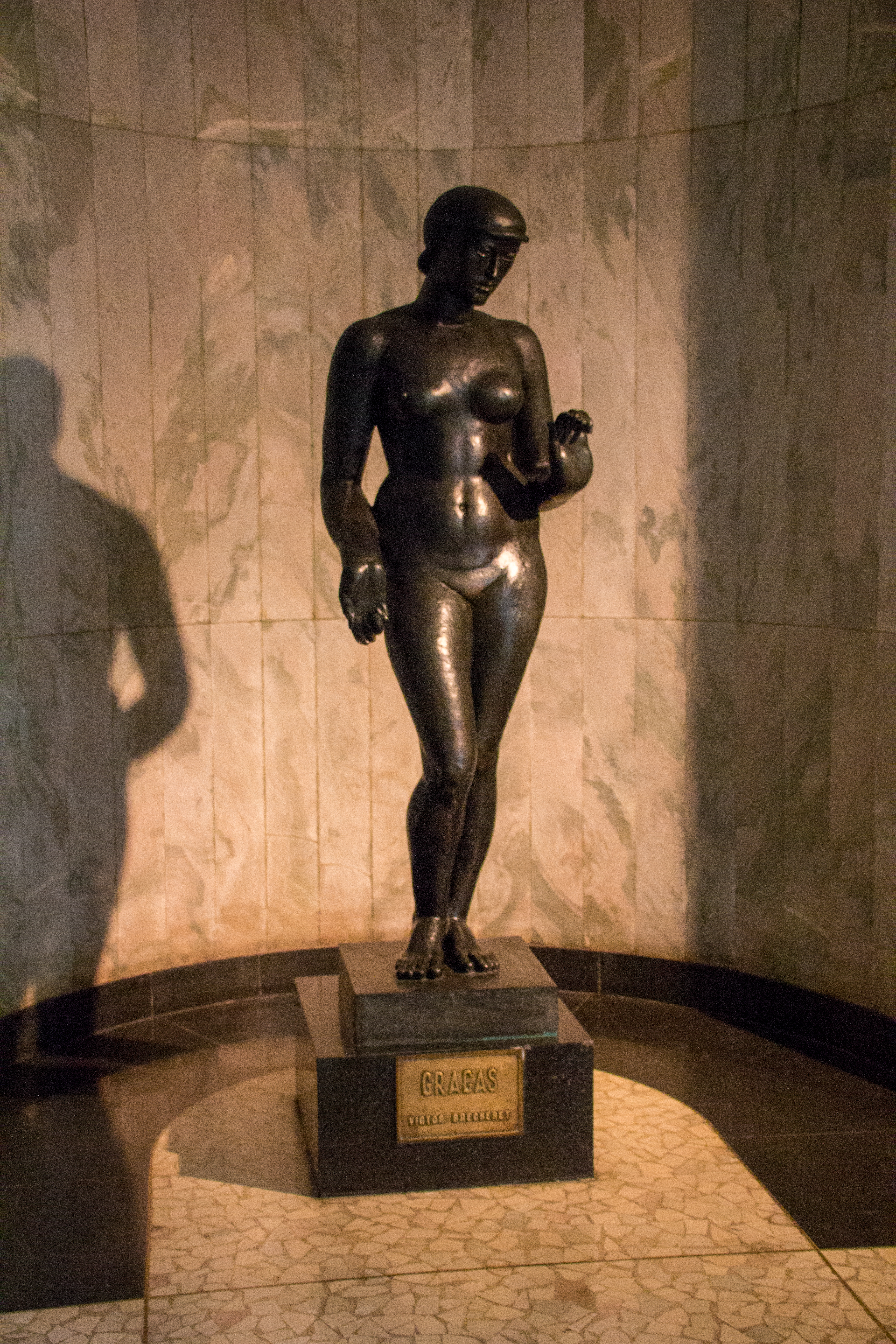 São Paulo, Brazil